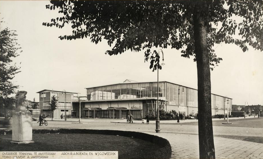 Apollohal in Amsterdam before renovation